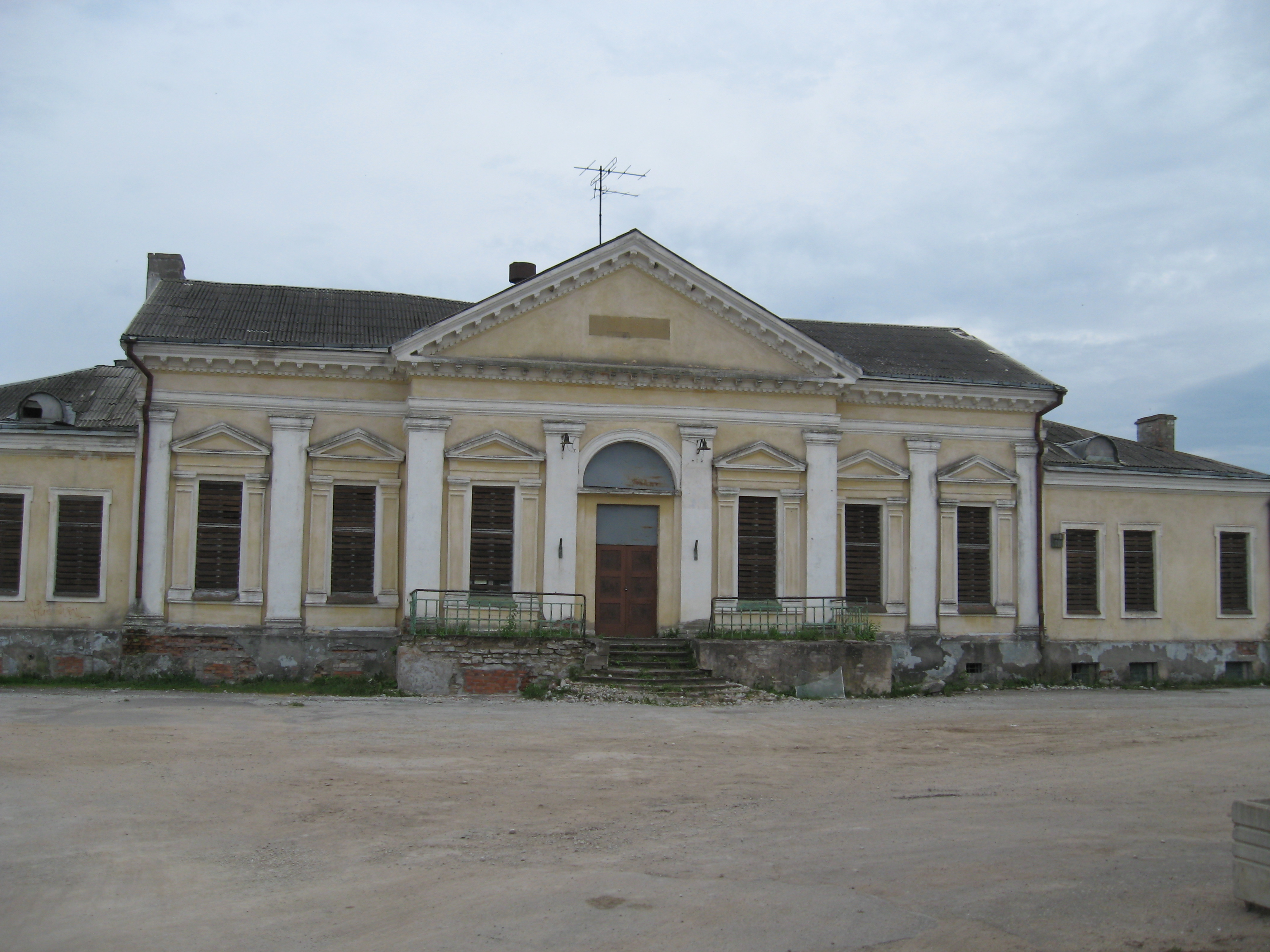 Заброшенное здание железнодорожного вокзала в Йыхви